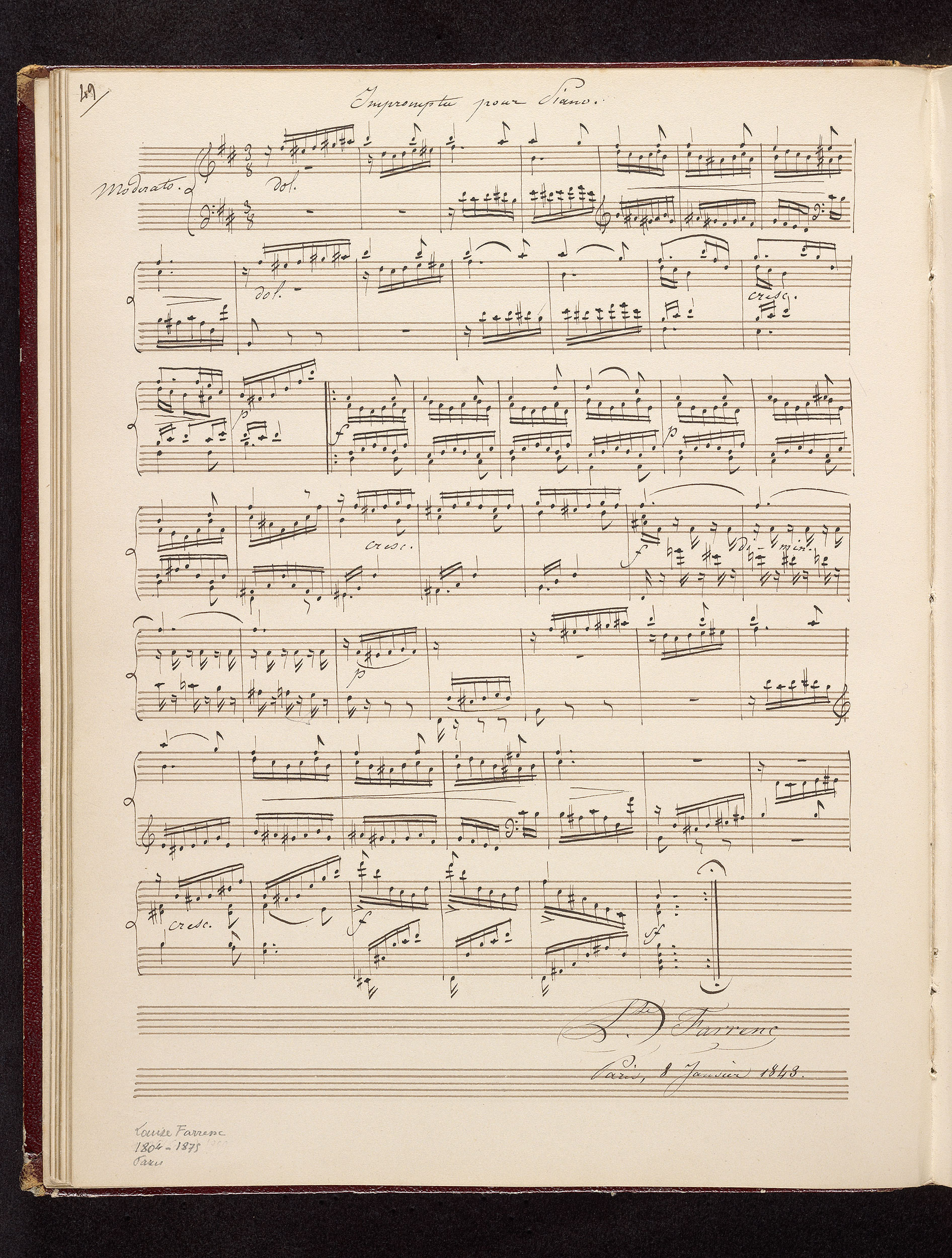 Nuottikäsikirjoitus Louise Farrencin sävellyksestä Impromptu pianolle (1843)